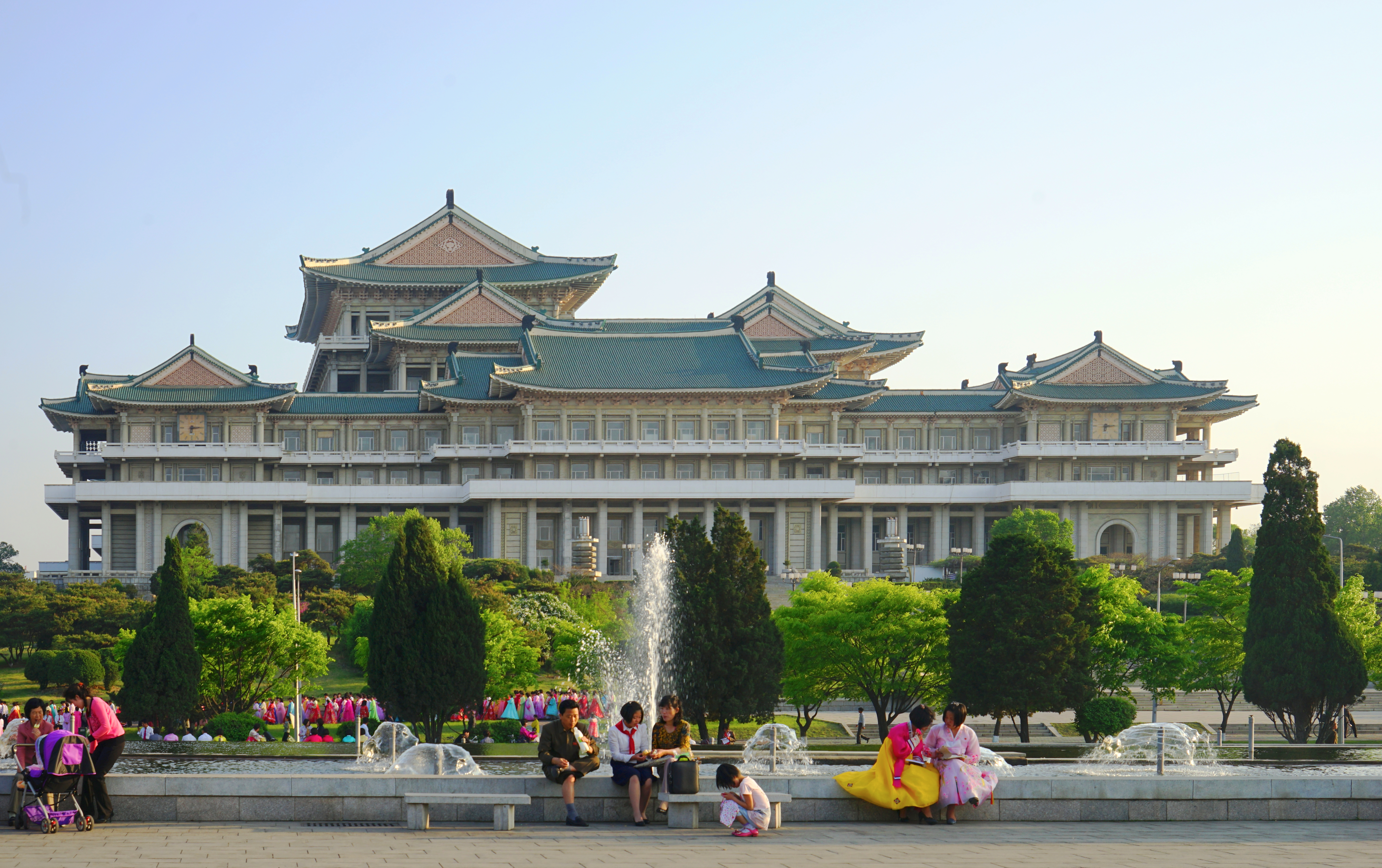 朝鮮民主主義人民共和国平壌市人民大学習堂